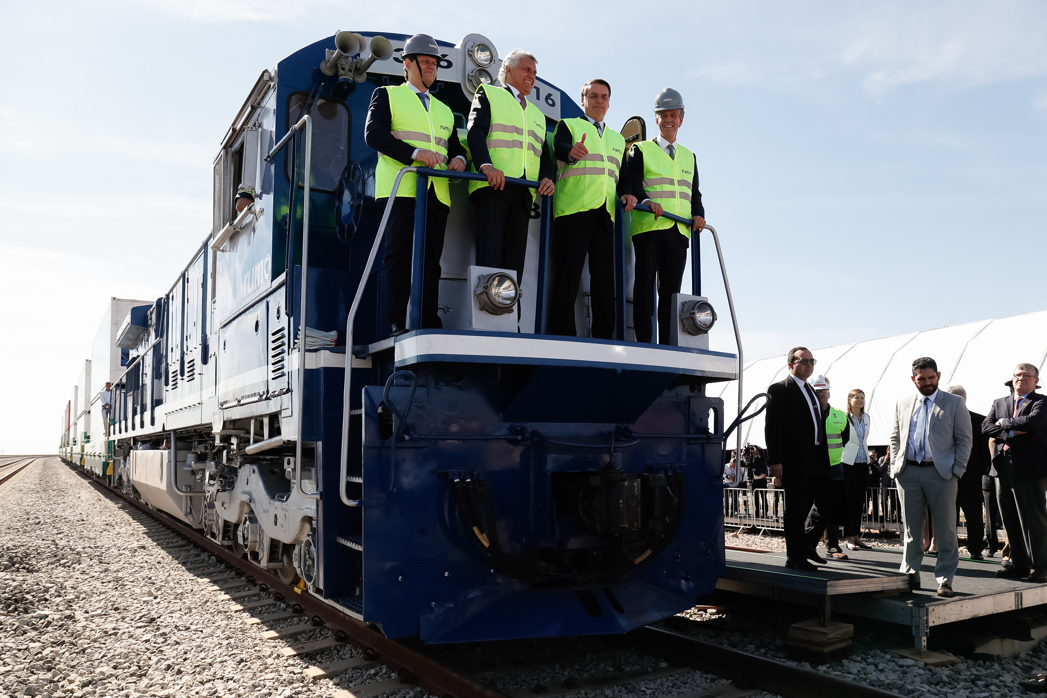 (Anápolis - GO, 31/07/2019) Presidente da República, Jair Bolsonaro posa para foto durante visita à locomotiva. Foto: Alan Santos/PR